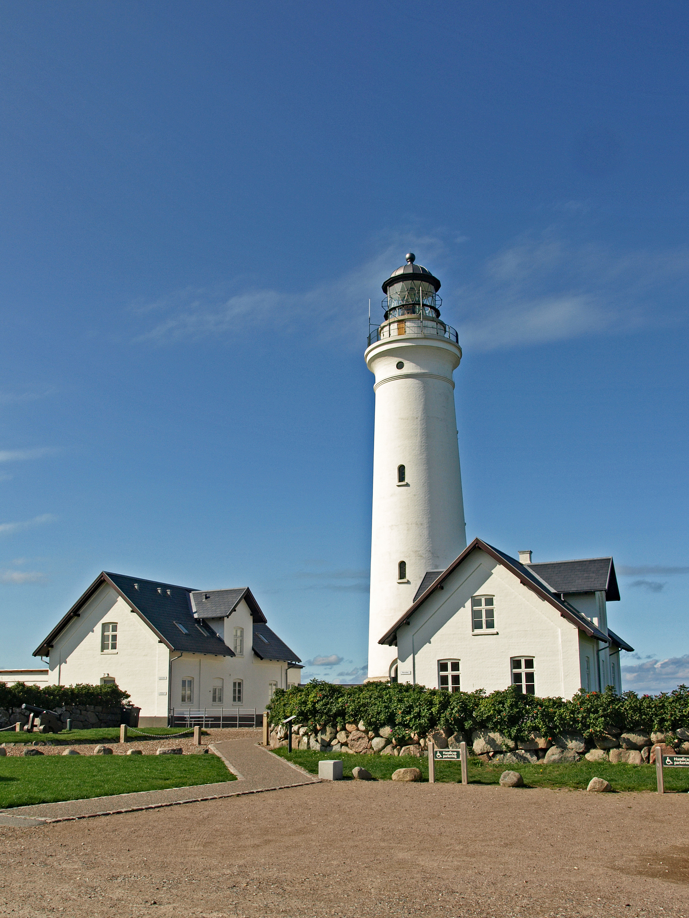 Leuchtturm Hirtshals